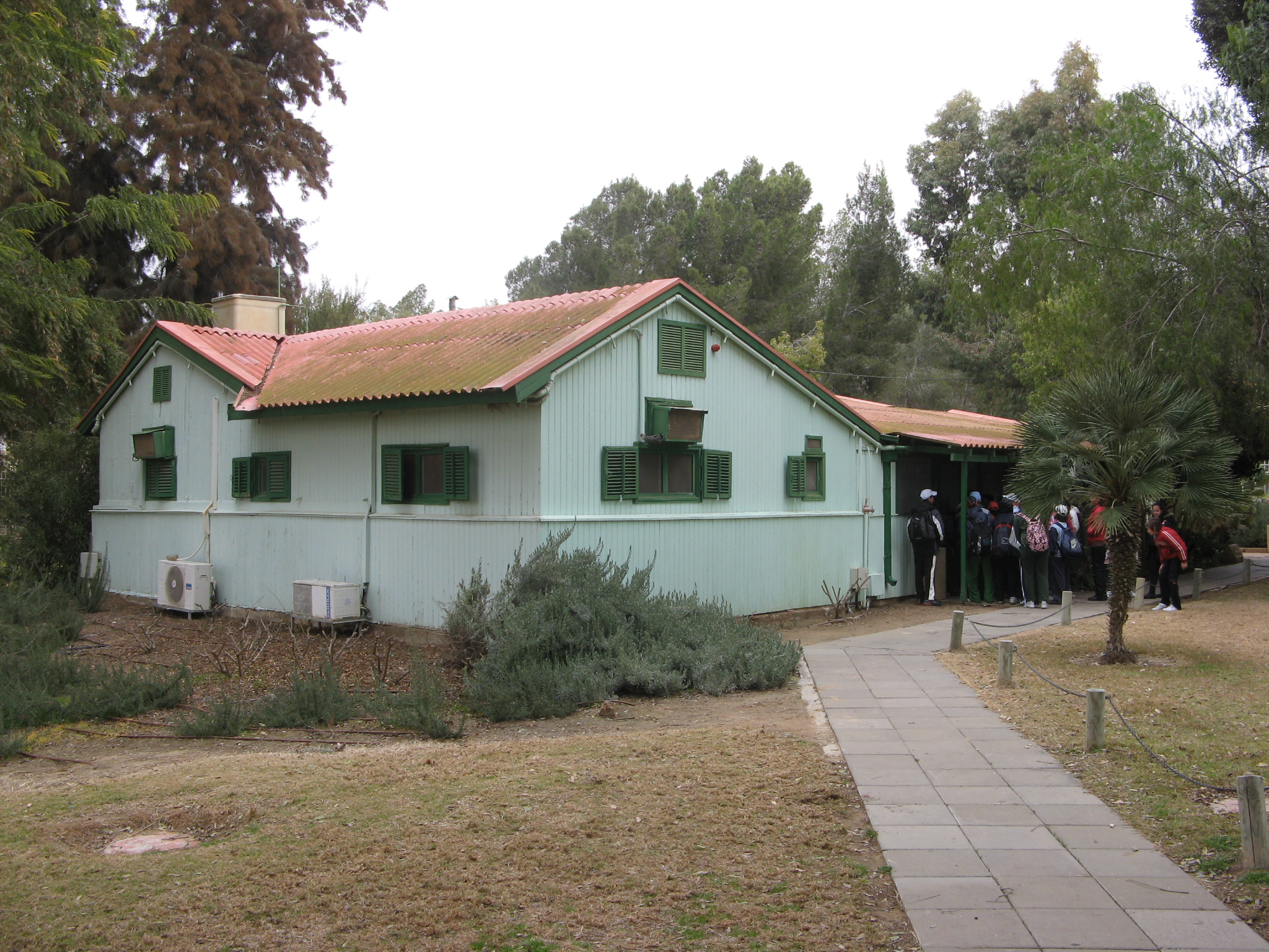 Ben Gruion's residence in Sdeh Boker